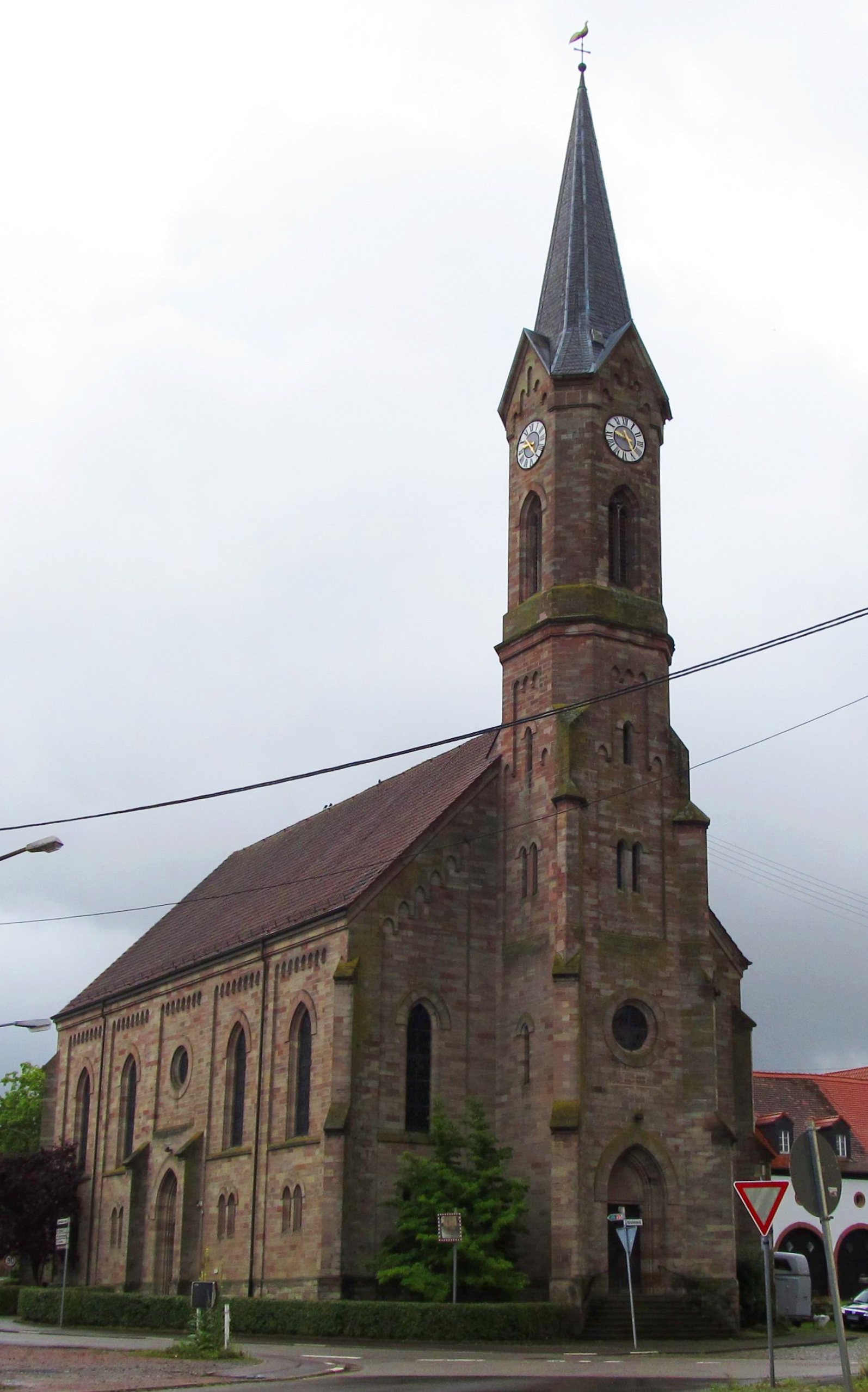 Die protestantische Martin-Luther-Kirche in Webenheim. einem Stadtteil von Blieskastel, Saarland